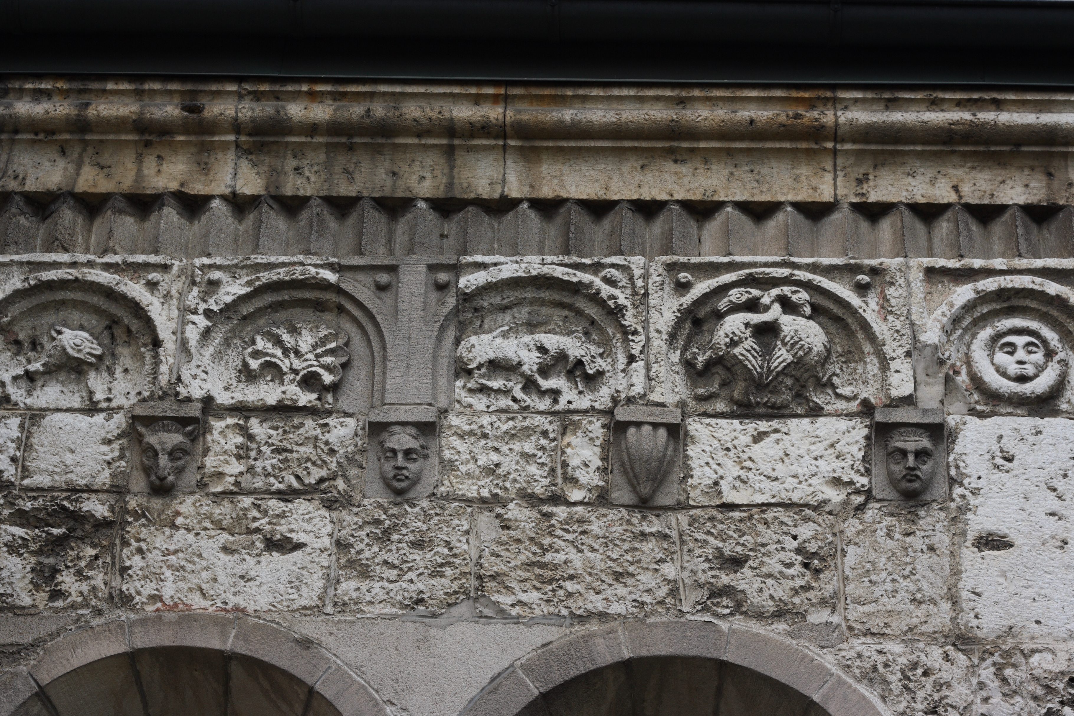 Evangelische Kirche St. Gallus in Brenz an der Brenz, einem Ortsteil von Sontheim an der Brenz (Baden-Württemberg), Bogenfries mit Reliefplatten